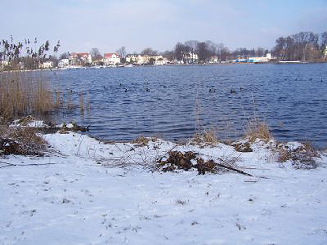 Park Babelsberg, Winter